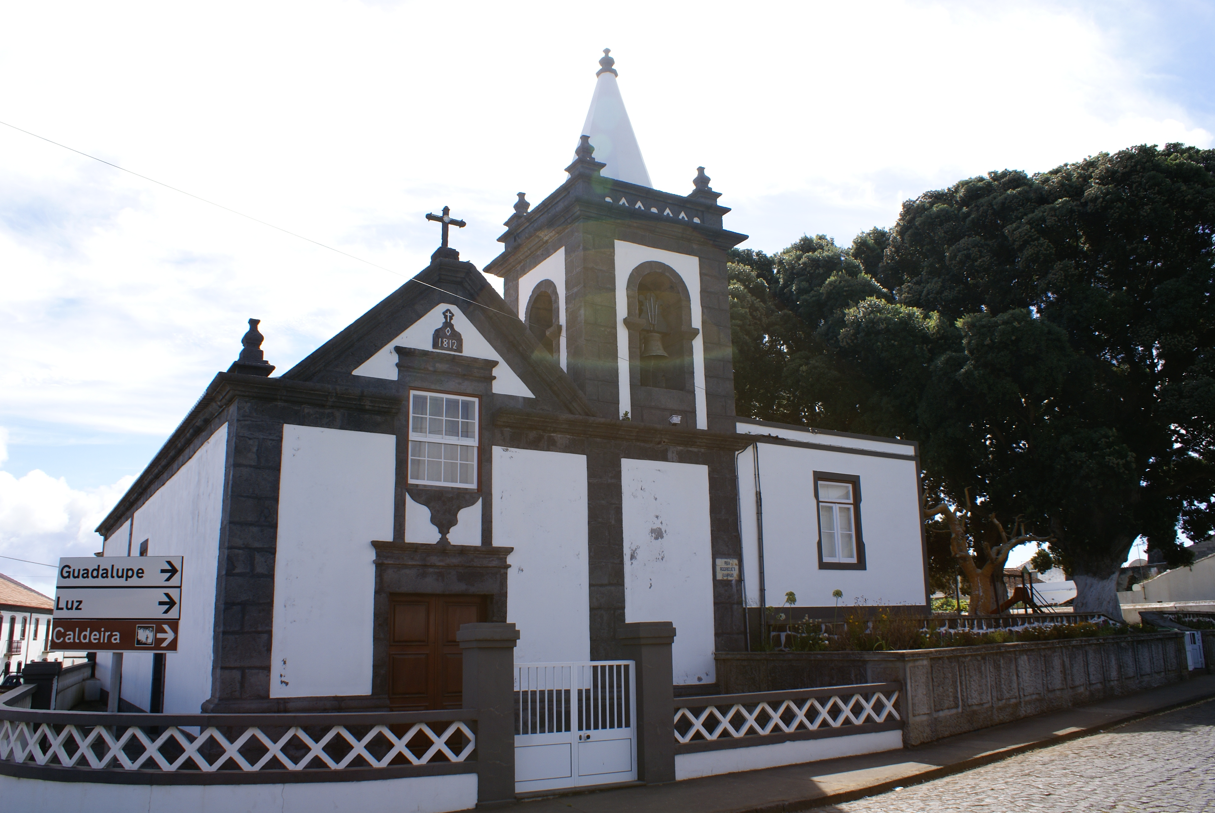 Igreja da Misericórdia, vila da Praia, ilha Graciosa, Açores, Portugal